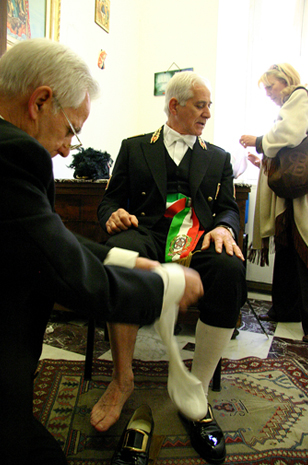 Vestizione del Capitano alla processione della Real Maestranza a Caltanissetta.